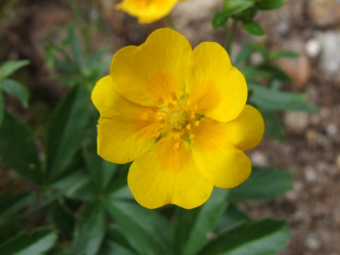 Potentilla crantzii (pl. pięciornik alpejski), habitat: Dolina Miętusia, West Tatra Mountains